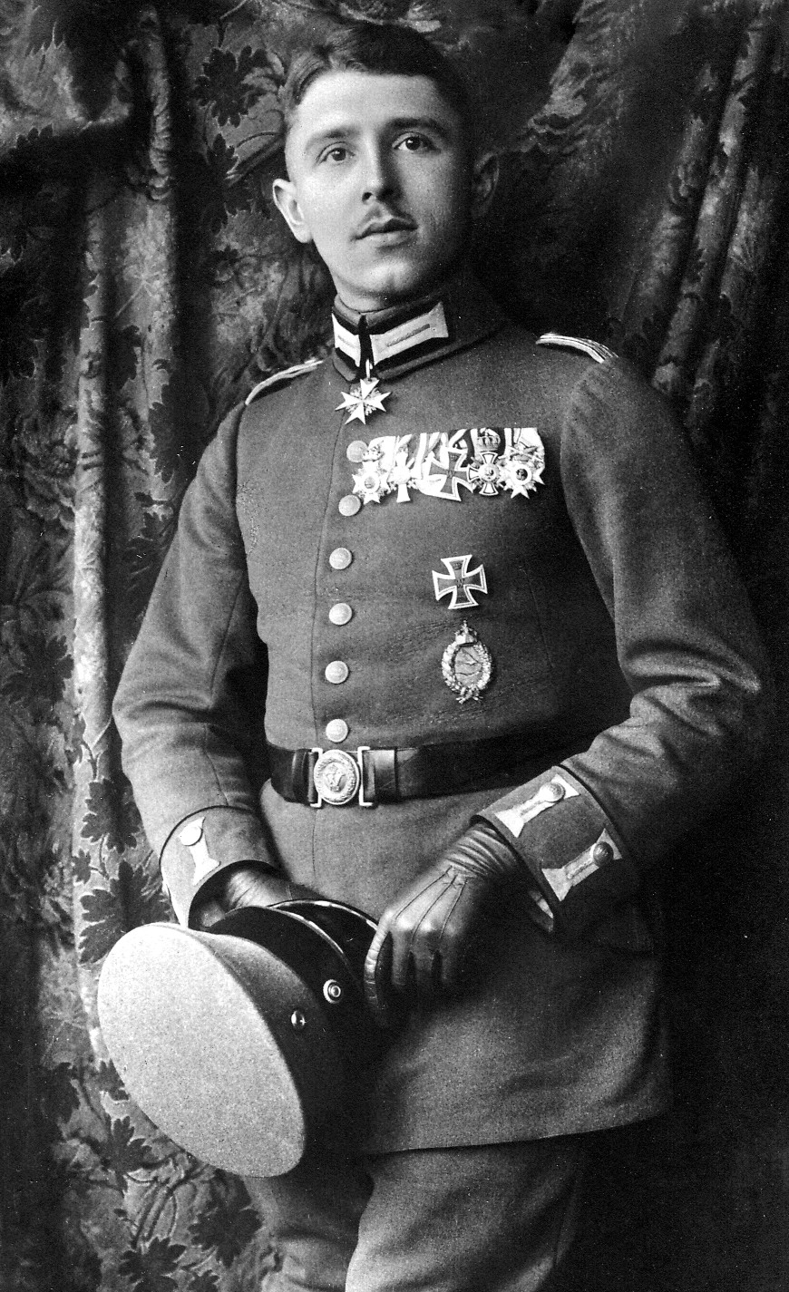 Beschreibung: Max Immelmann, Flieger-AsS aus dem 1. Weltkrieg Quelle: Download von - unter keine nähere Quelle angegeben Lizenz: "Dieses Bild wurde von einem Public Domain-Werk durch das -Great War Primary Documents Archive eingescannt. Es ist für freie Nutzung freigegeben unter der Voraussetzung der Quellenangabe und eines Links siehe auch: - Nutzungsbedingungen mit zugedrücktem Auge --Crux 19:51, 16. Feb 2006 (CET)